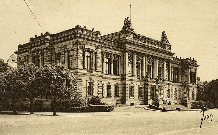 Strasbourg (Bas-Rhin) Conservatoire de Musique (ancien Palais du Parlement alsacien). 1920. Bibliothèque nationale et universitaire de Strasbourg